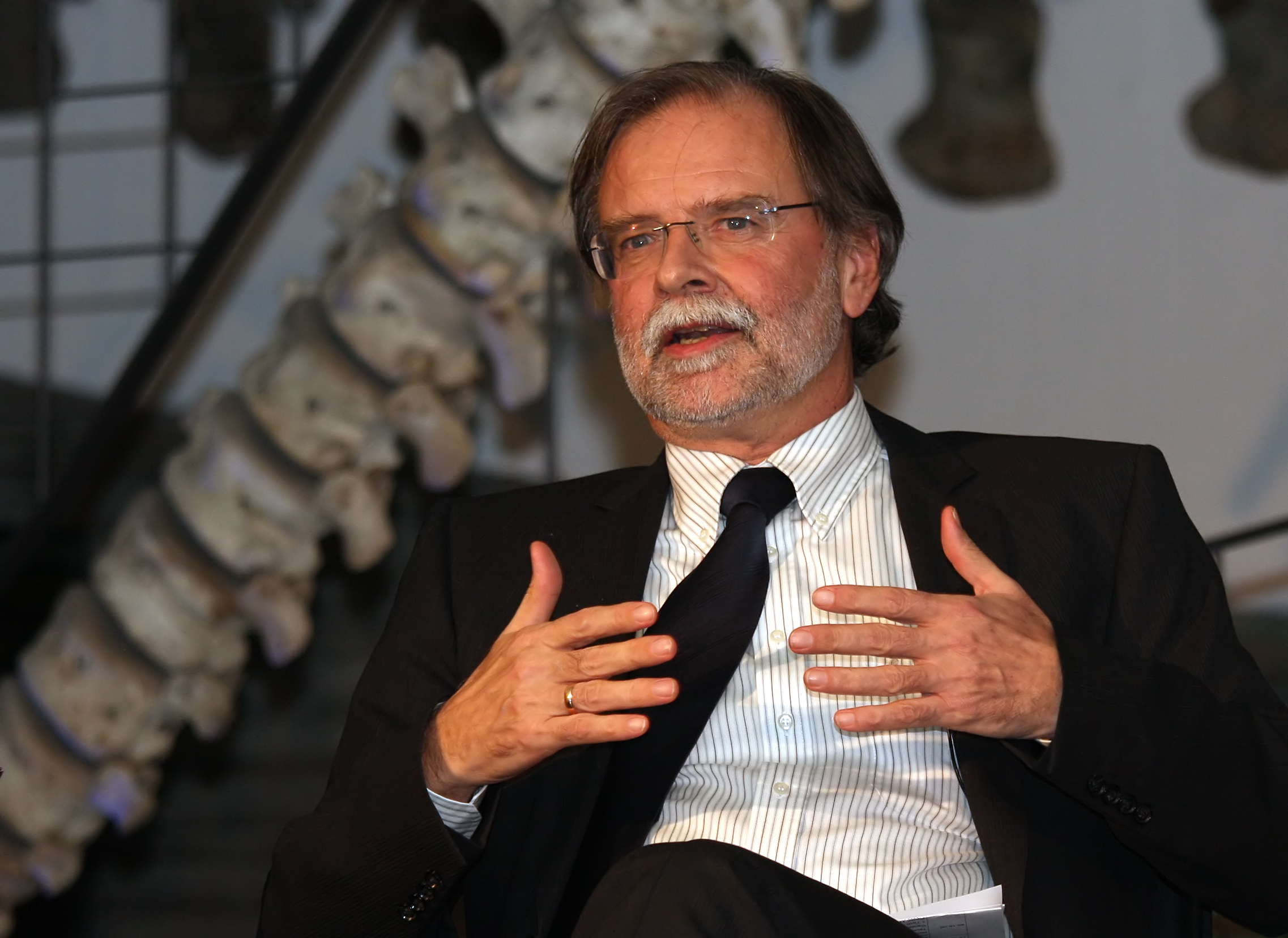 Volker Mosbrugger, Direktor des Forschungsinstituts und des Naturmuseums Senckenberg, Podiumsdiskussion zum Thema „Evolution des Wissens“ anlässlich der Verleihung der Zedler-Medaille 2009 im Senckenberg-Museum in Frankfurt am Main.